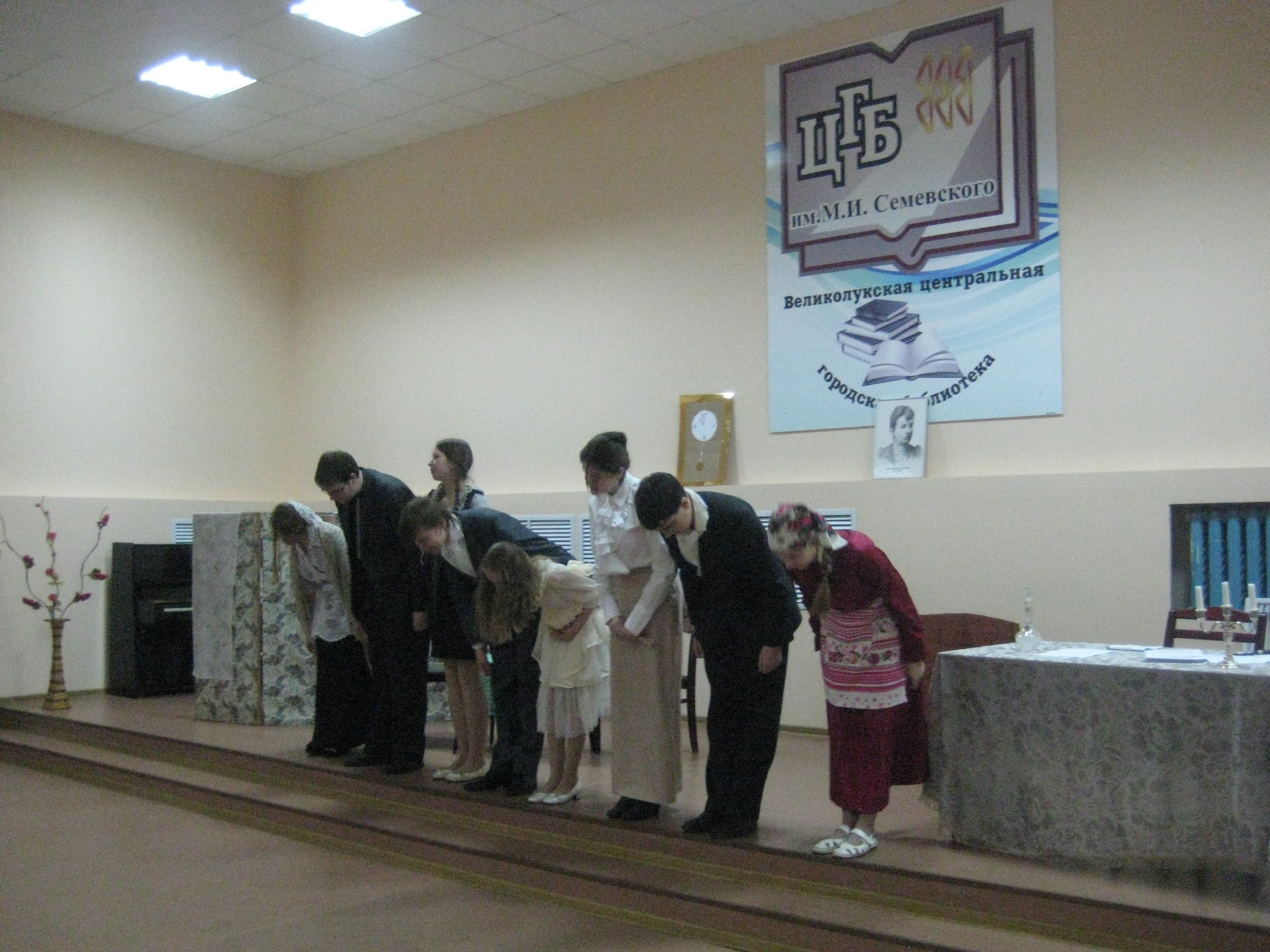 Постановка, основанная на истории детства Софьи